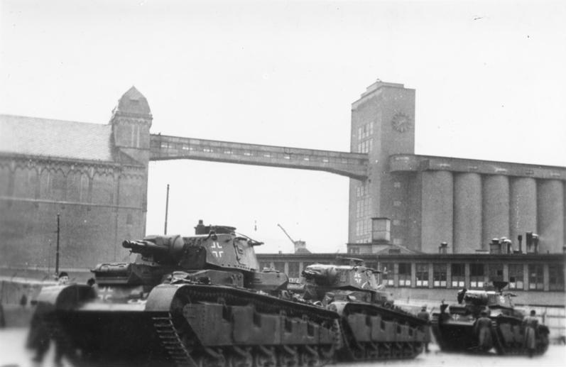 ADN-ZB/Archiv, II. Weltkrieg 1939-45 Nach dem Überfall des faschistischen Deutschlands auf Norwegen am 9. April 1940 Deutsche Panzer ["Neubaufahrzeug"] im Hafen von Oslo, unmittelbar nach dem Entladen der Transportschiffe, aufgenommen Mitte April 1940.